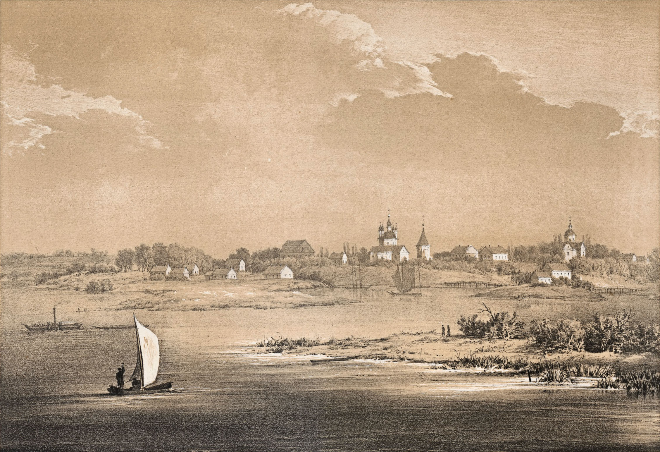 Беларуская (тарашкевіца): Тураў (Turaŭ) з боку ракі Прыпяці (Prypiać)